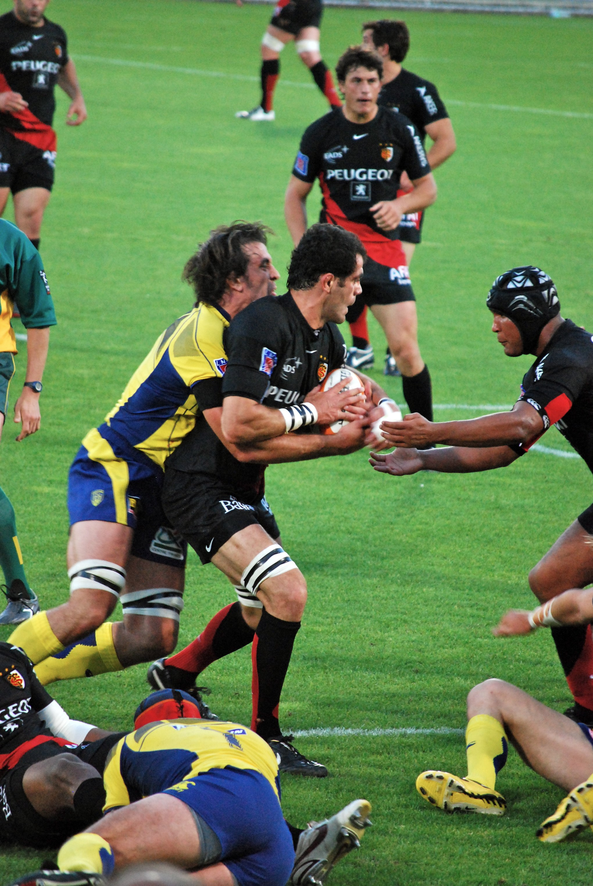 Gégory Lamboley, soutenu par Thiery Dussautoir, est plaqué par Julien Pierre lors de la demi-finale de top 14 2008-2009 opposant Clermont à Toulouse